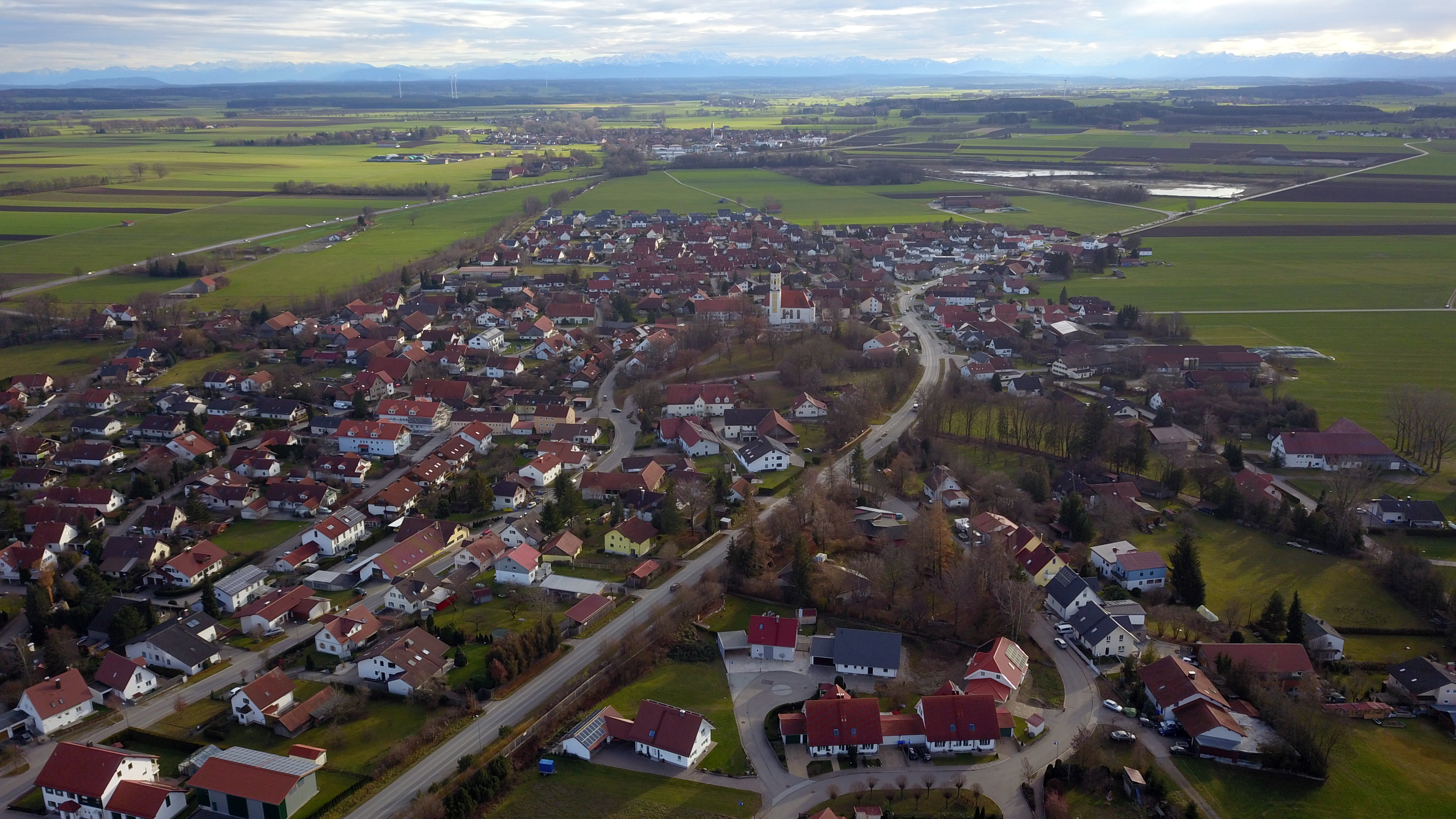 Luftaufnahme Lindenberg (Buchloe) mit der durch den Ort führenden Staatsstraße 2035